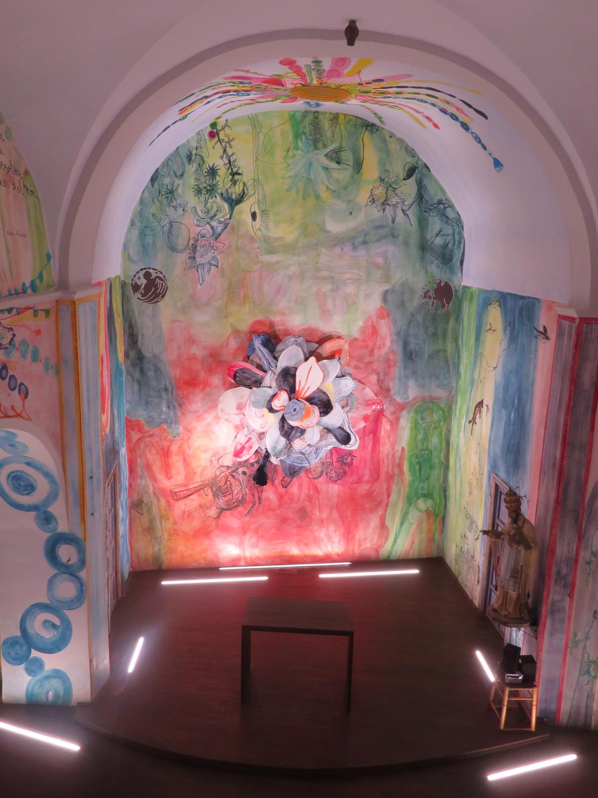 Pintures de Santi Moix a l'interior de Sant Víctor de Saurí